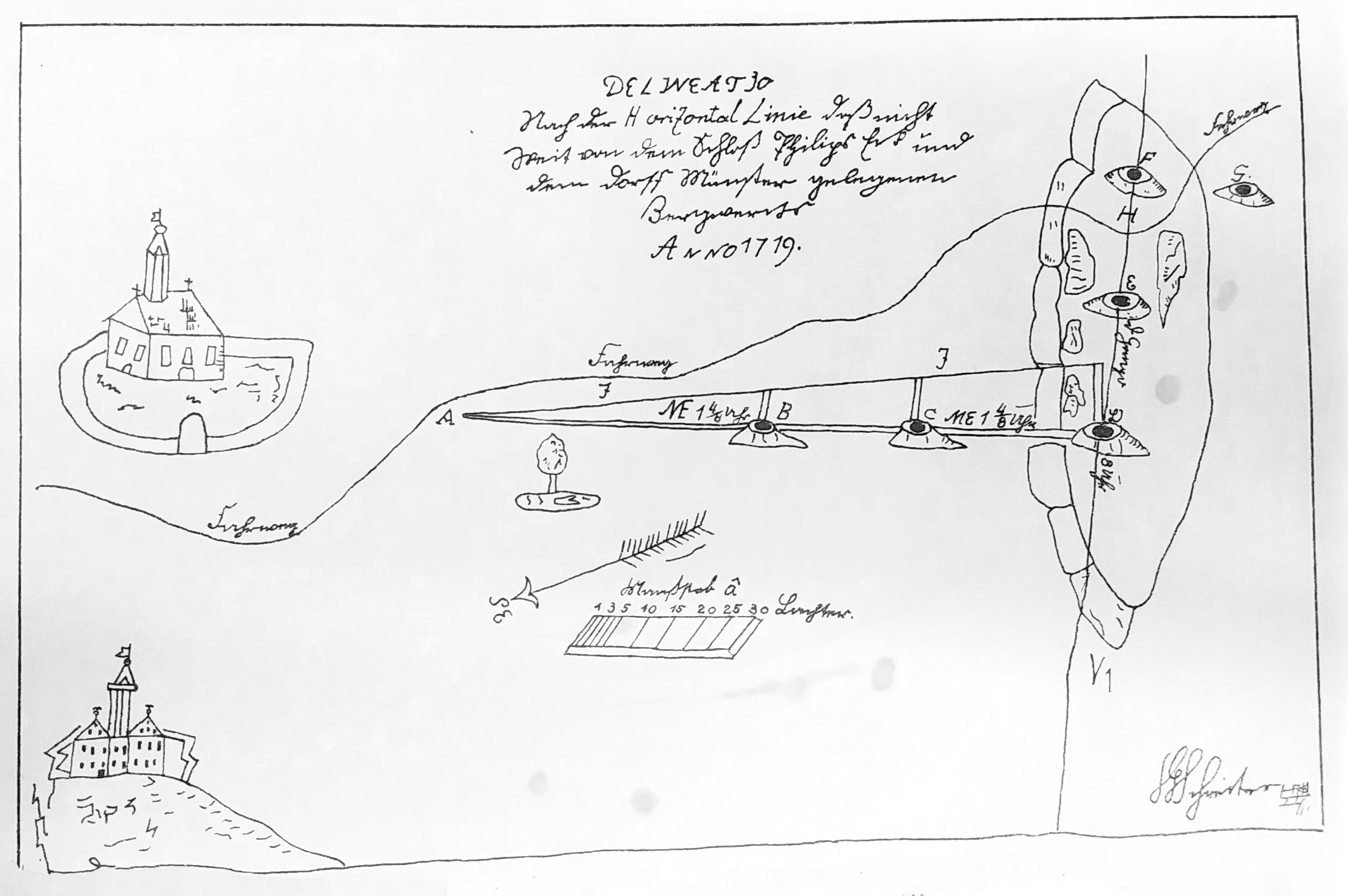 Grube Philippseck im Jahr 1719. Ansicht des Stollens und der Schächte. Links unten ist das inzwischen abgegangene Schloss Philippseck dargestellt, links Mitteː die Kirche von Münster. Neben der eher bildhaften Darstellung der Grube Silbersegen aus 1544 ist dieser Grubenplan der älteste in Hessen. Das Mundloch des Stollens liegt bei "A". Die Karte ist nicht genordet, Nordpfeil in der Bildmitte.